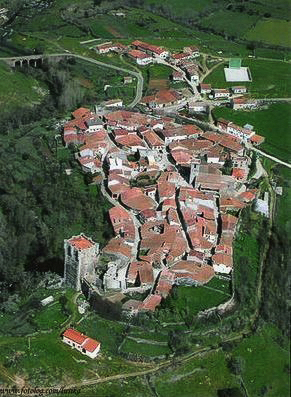 Vista aerea de Monleón (Salamanca, España)